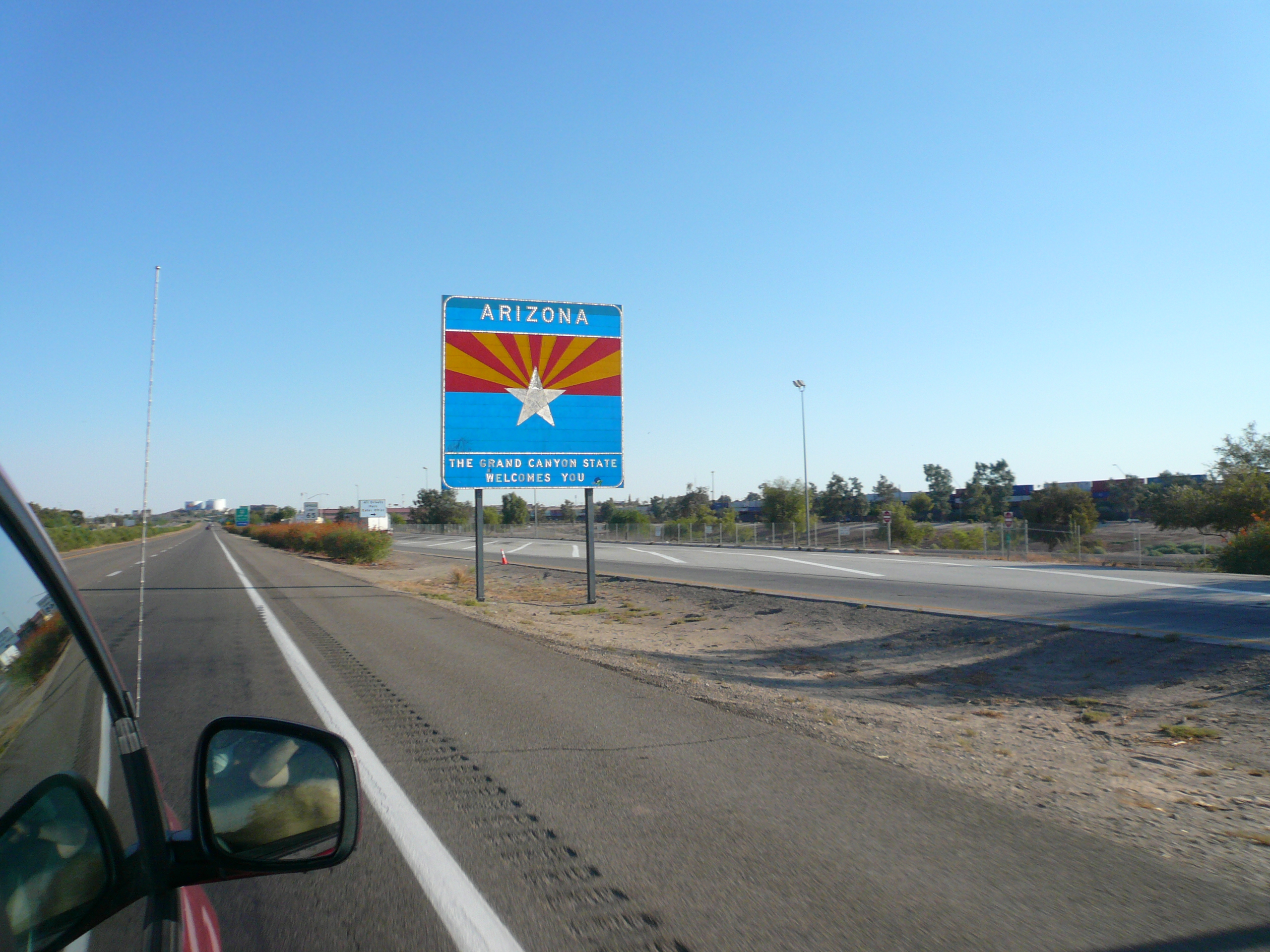 Highway Schild Arizona